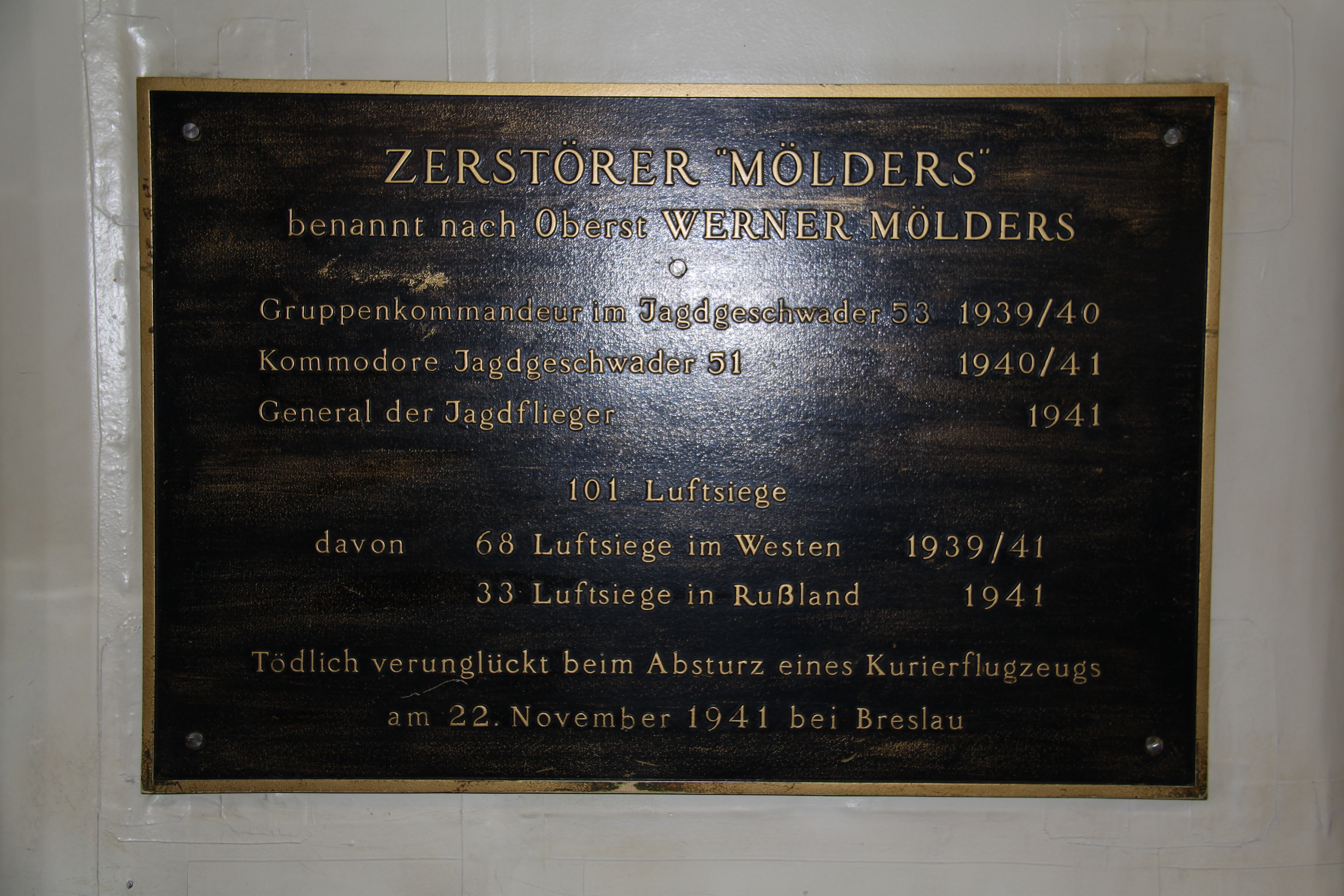 Informationsschild im Zerstörer "Mölders" im Deutschen Marinemuseum Wilhelmshaven